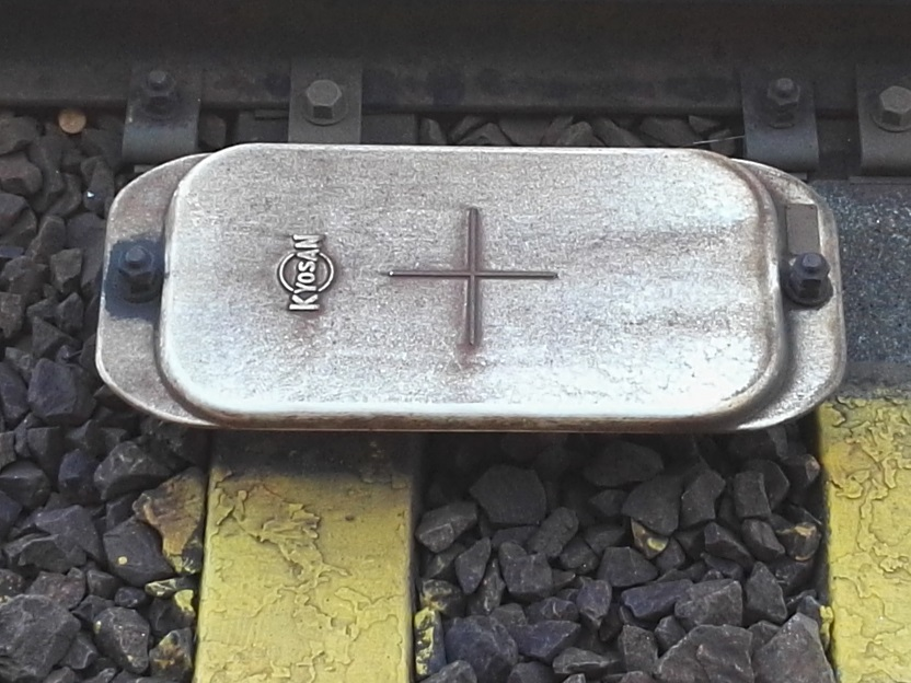 Meitetsu ATS at Odabuchi station (digital zoomed)